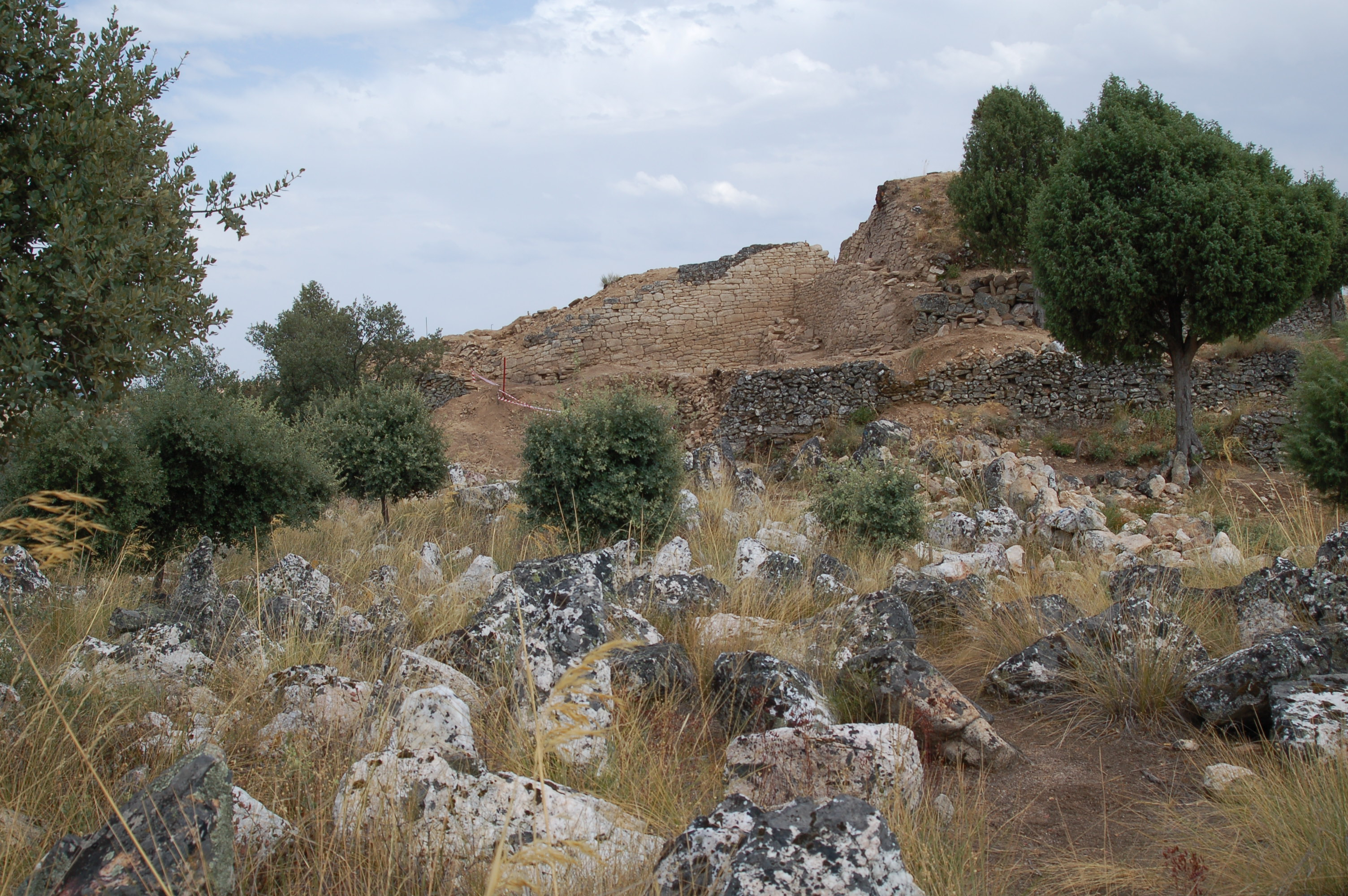 estruturas defensivas